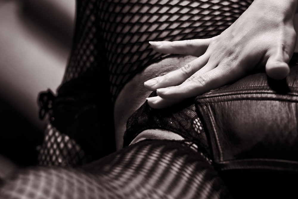 Eros Galicia - Sensual caricia